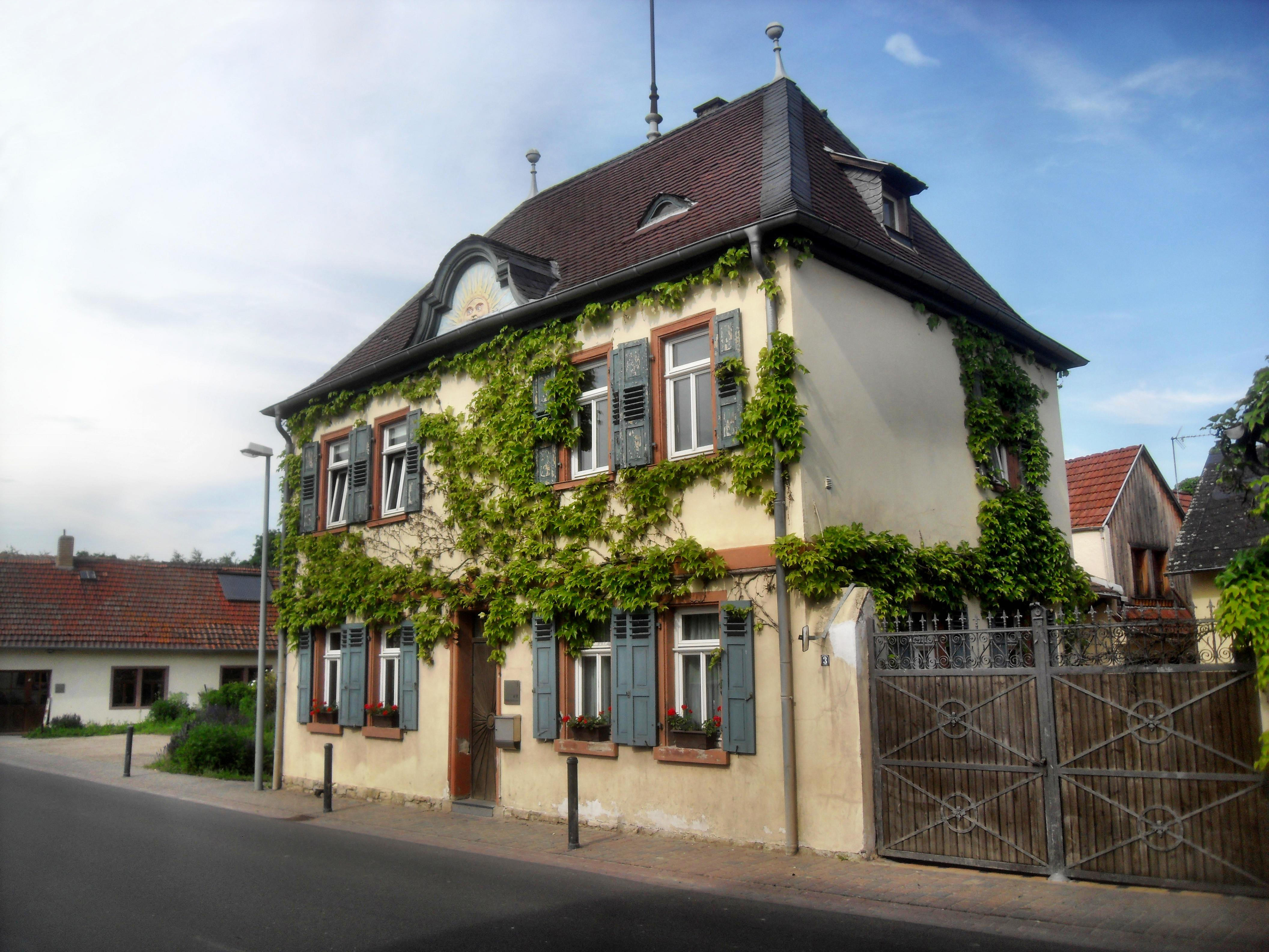 Das Weingut Brüder Dr. Becker im rheinhessischen Ludwigshöhe in Rheinland-Pfalz (Deutschland) von der Mainzer Straße aus